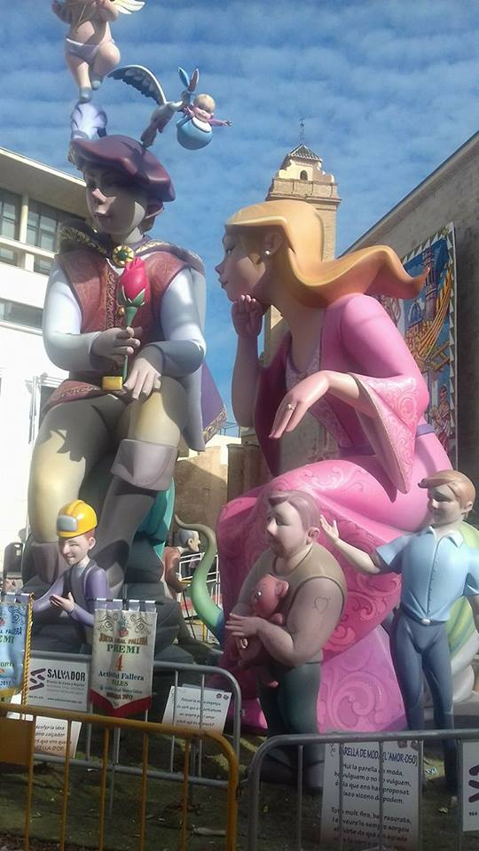 Falles de Borriana, 2017. This is a photography of a Folklore festival in Spain (Wikidata id Q23663119).